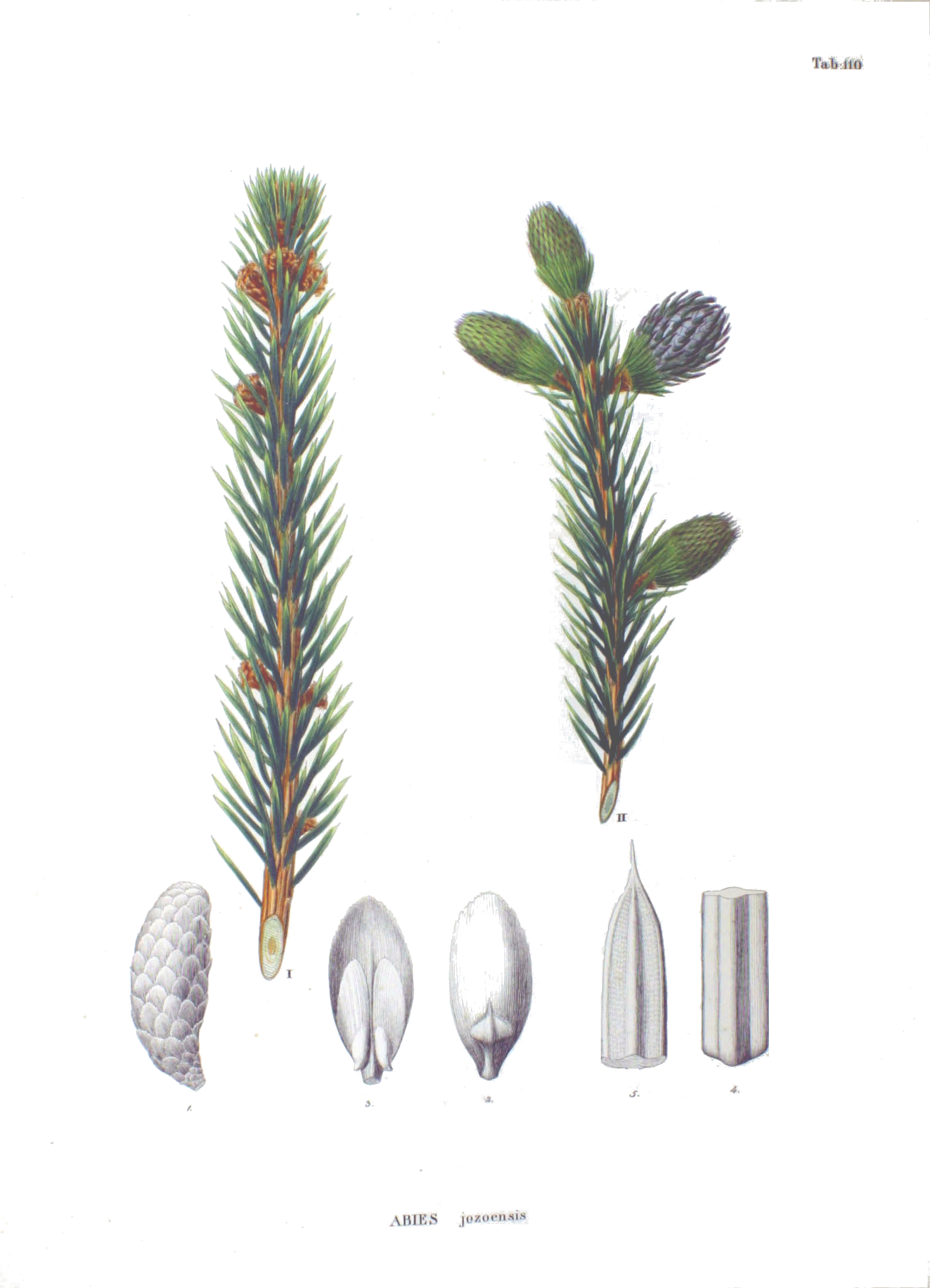 Plate from book Picea jezoensis (syn. Abies jezoensis)